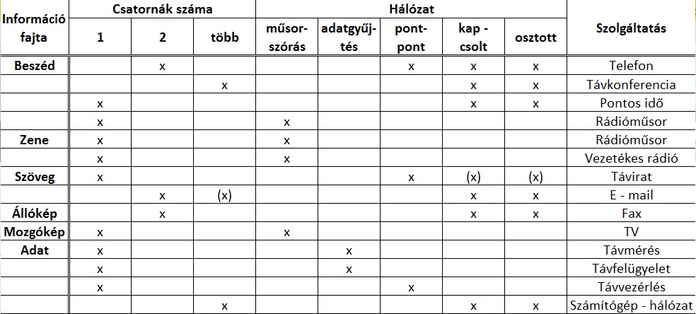 saját táblázat befotózva